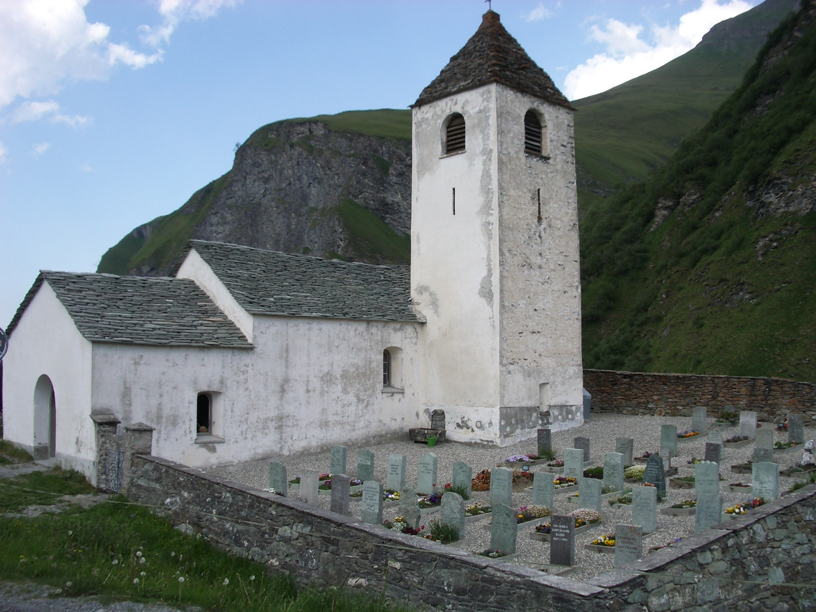 Thalkirch GR, Switzerland self-made, June 2006